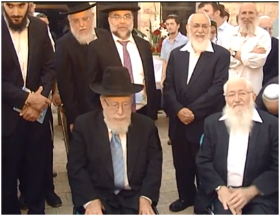 נשיאי ישיבת ניר